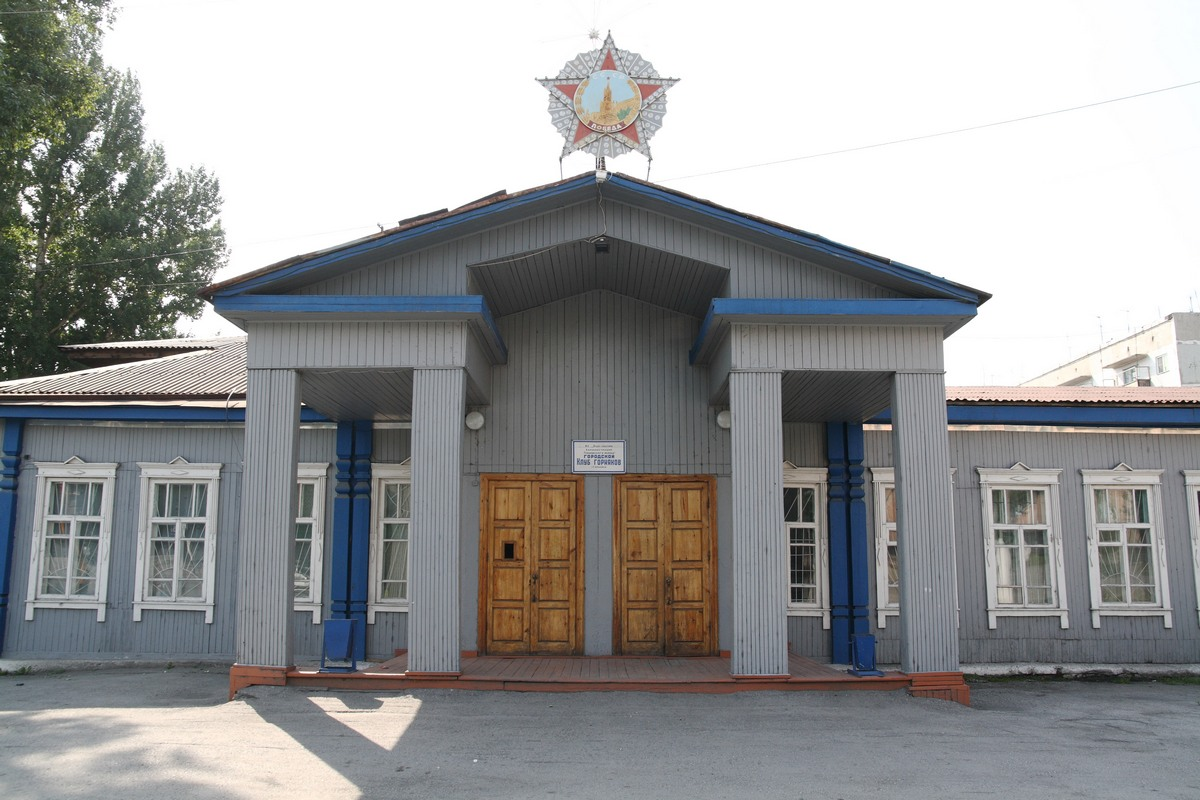 Городской клуб горняков